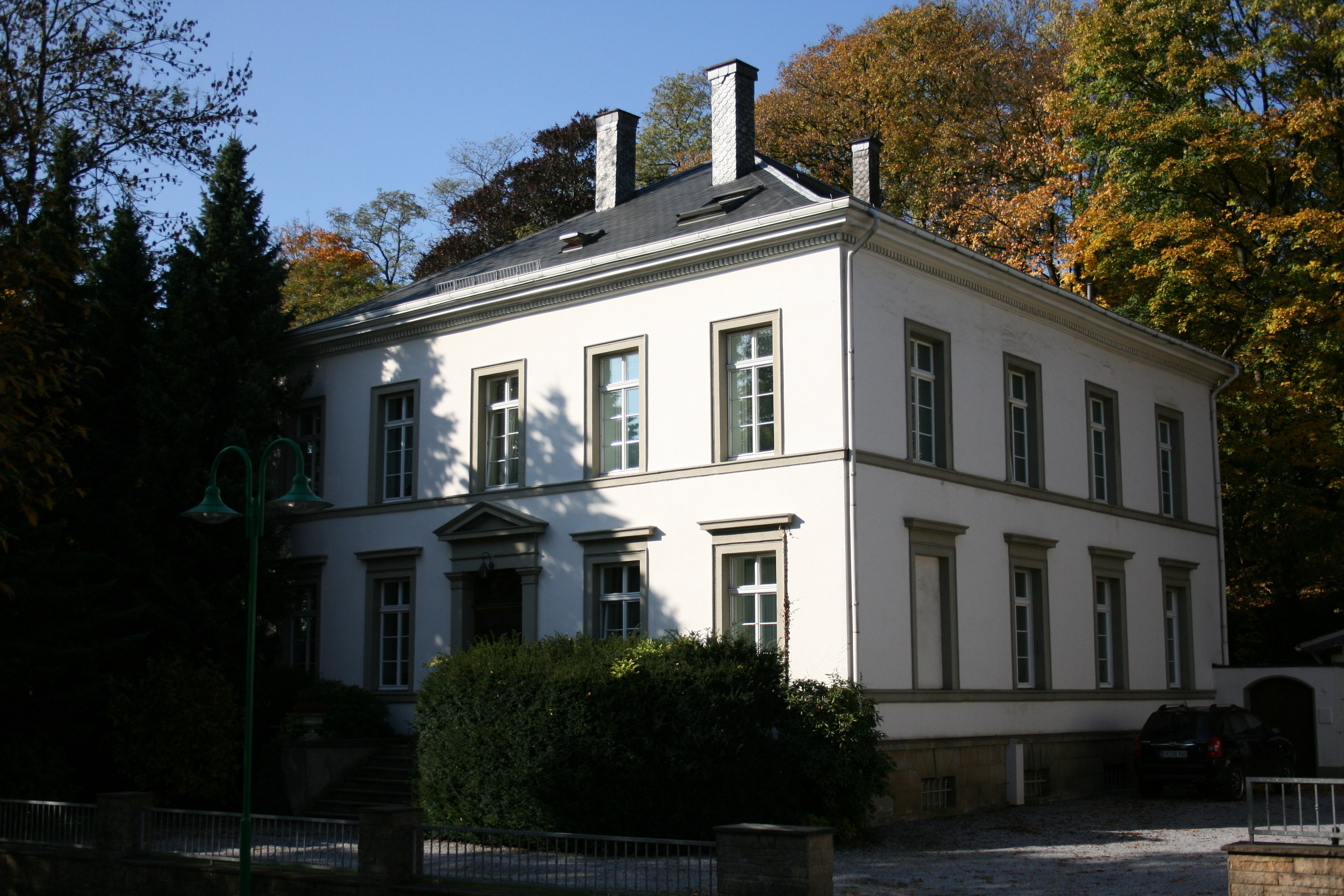 Milsper Straße in Ennepetal-Voerde